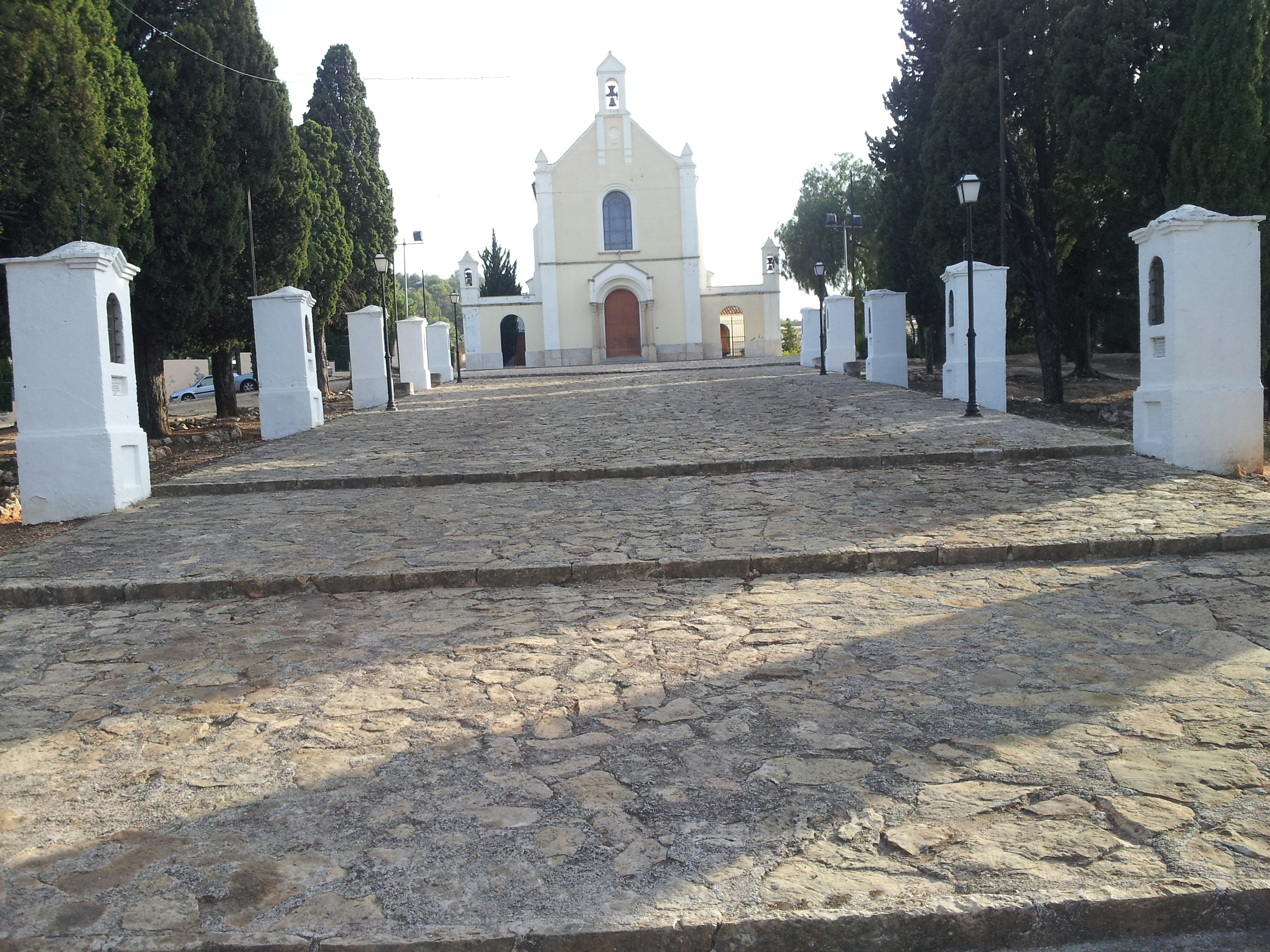 Imatges de la localitat.